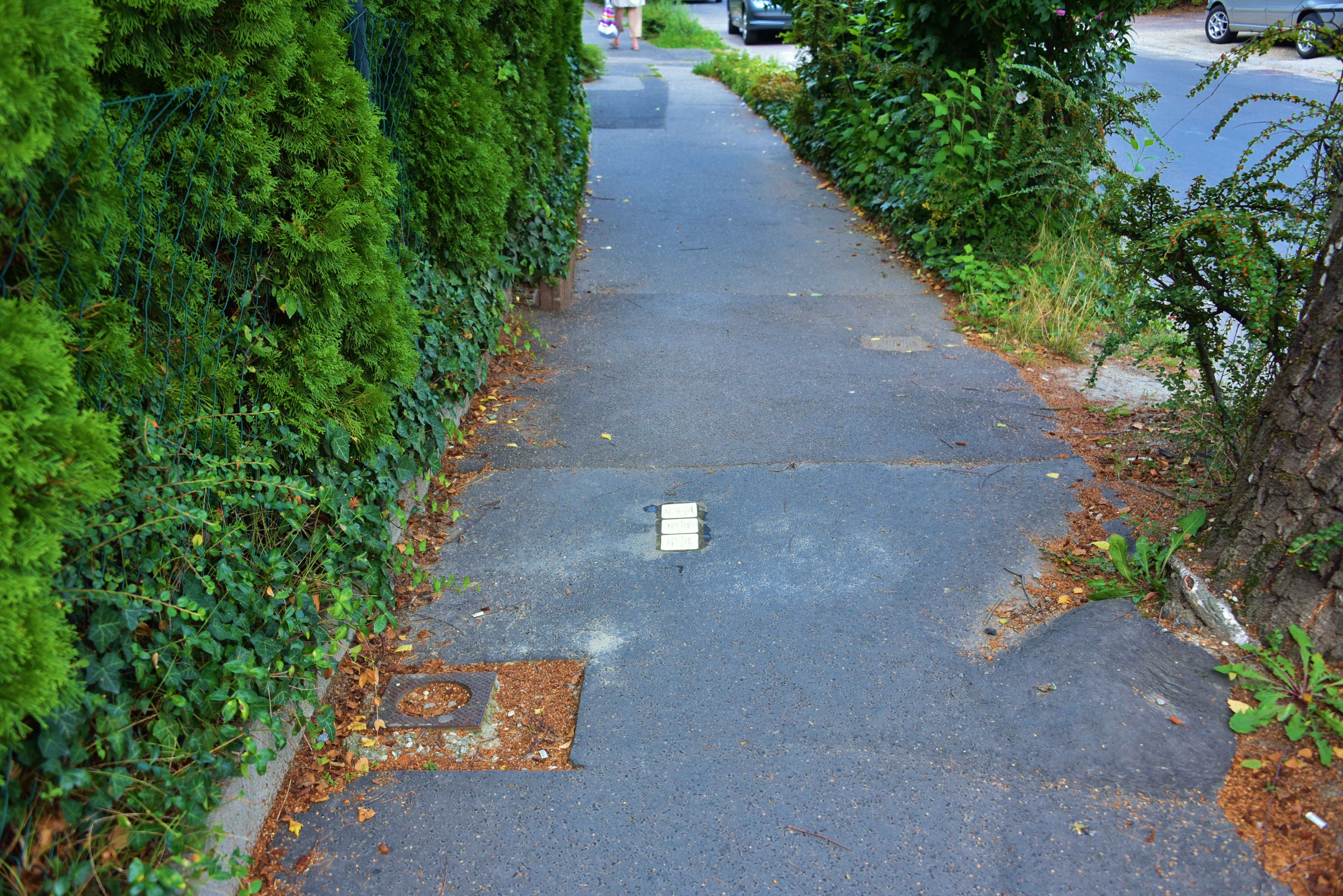 Stolpersteine in Györ